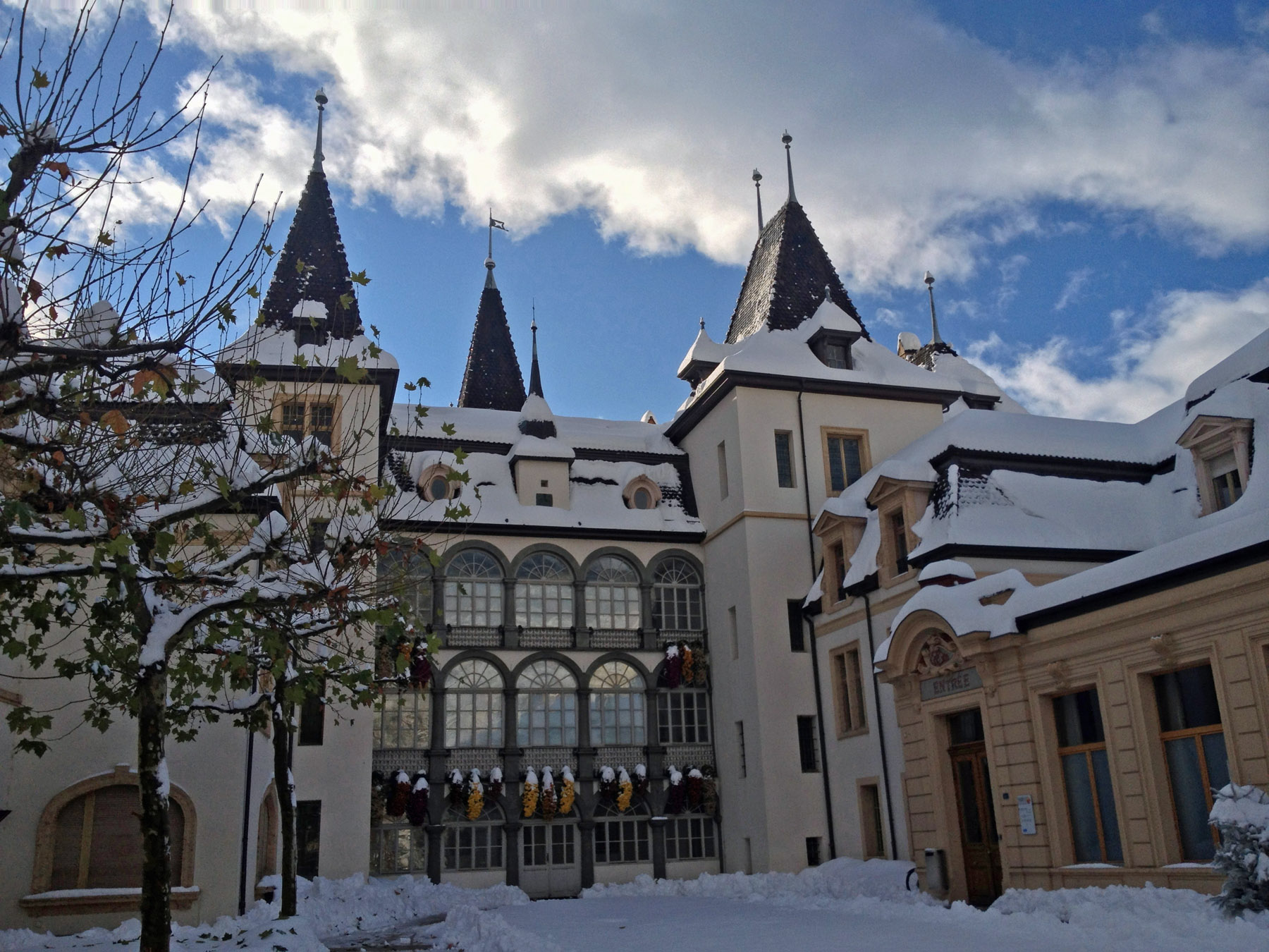 Hôtel de Ville de Sierre